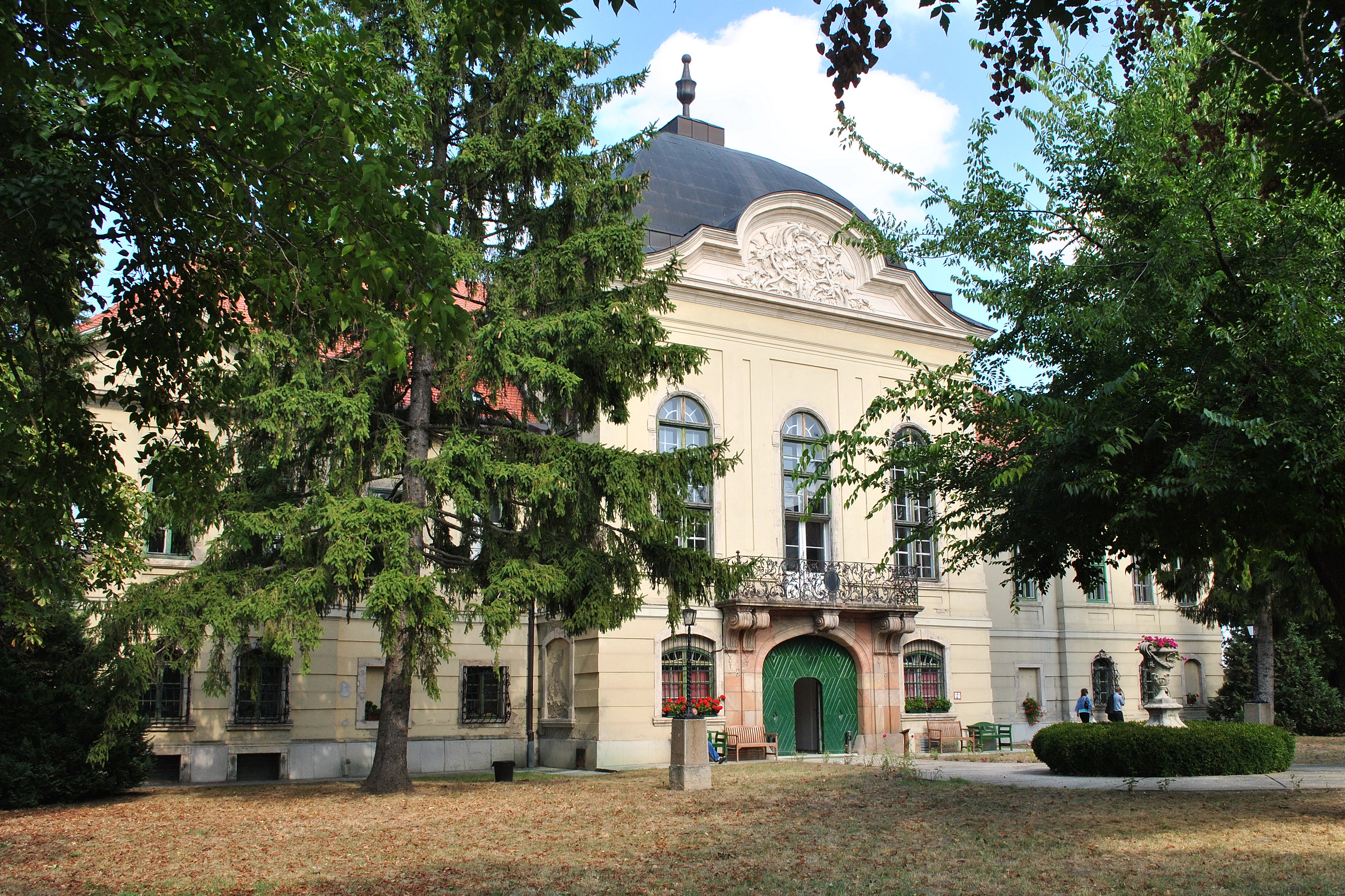 Ráday-kastély (Pécel, Kálvin tér 1.) This is a photo of a monument in Hungary. Identifier: 7216